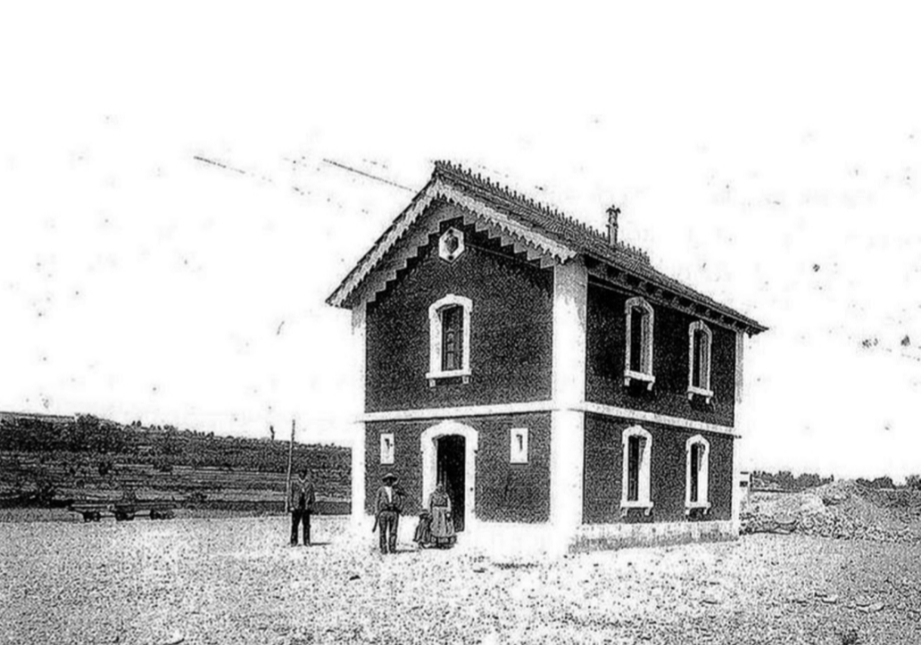 Edificio de la Estación de Miraflores (Zaragoza) en 1884.